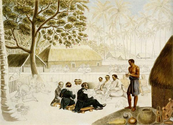 Михайлов Павел Николаевич - Завтрак у Оттаитского короля